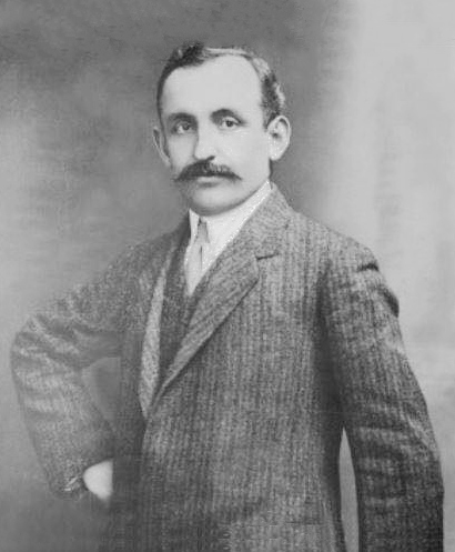 Andon Zako Çajupi (27 March 1866 – 11 July 1930)